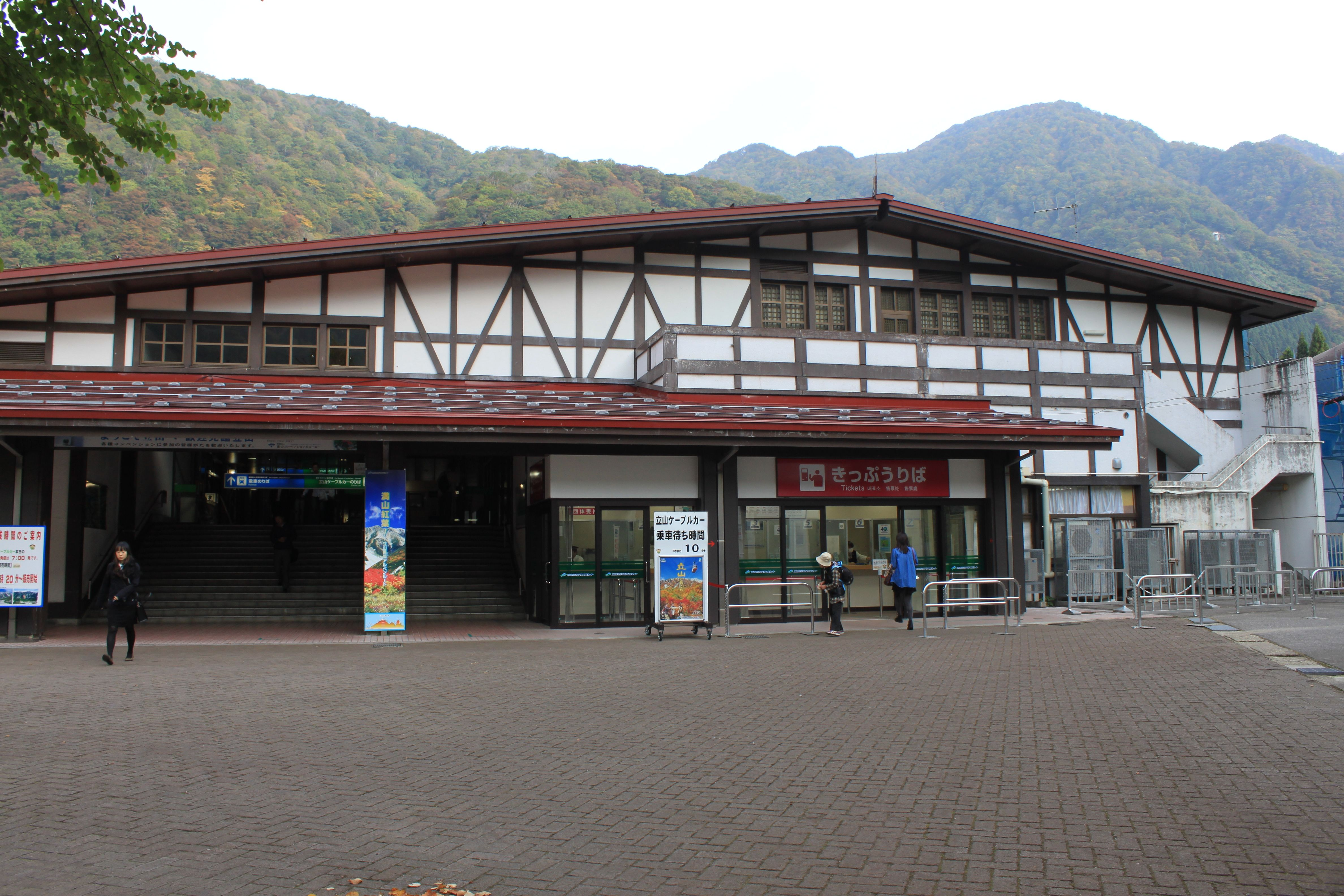 立山駅